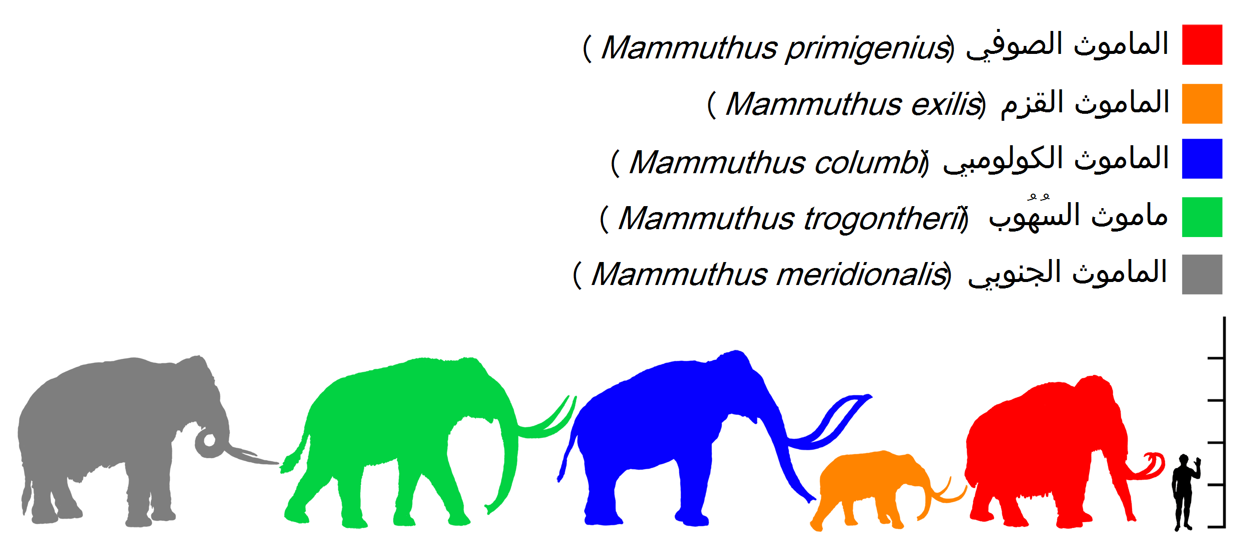 مُقارنة بين أحجام أنواع المواميث. الماموث الصُوفي (3.4 أمتار)، الماموث القزم (1.8 أمتار)، الماموث الكولومبي، ماموث السُهُوب، والماموث الجنوبي (4 أمتار).